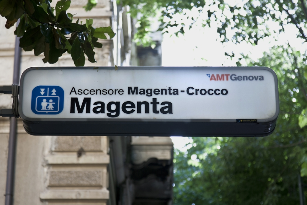 Ascensore Magenta Crocco Genova